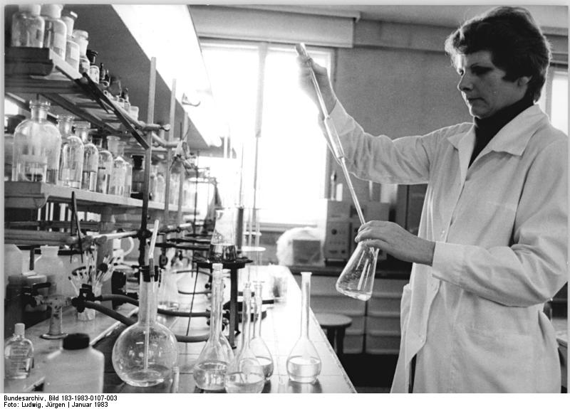 ADN-ZB-Ludwig-7.1.83-Bez.Erfurt: Der effektivere Einsatz von Zement und Sekundär-rohstoffen ist u.a. das Ziel der Forschungen der Mitarbeiter des Instituts für Baustoffe Weimar der Bauakademie der DDR in Zusammenarbeit mit Bauschaffenden. Hohe Forderungen an die Festigkeit, Oberflächengüte und an die Dichte der nach neuen Rezepturen gefertigten Betonelemente werden dabei gestellt. Als Feinstzuschlagstoff wird Flugasche aus Kraftwerken genutzt. Gisela Ludwig ist bei einer chemischen Untersuchung von Filterasche.